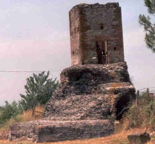 Torretta Romana situata nell'appia antica a Frattocchie